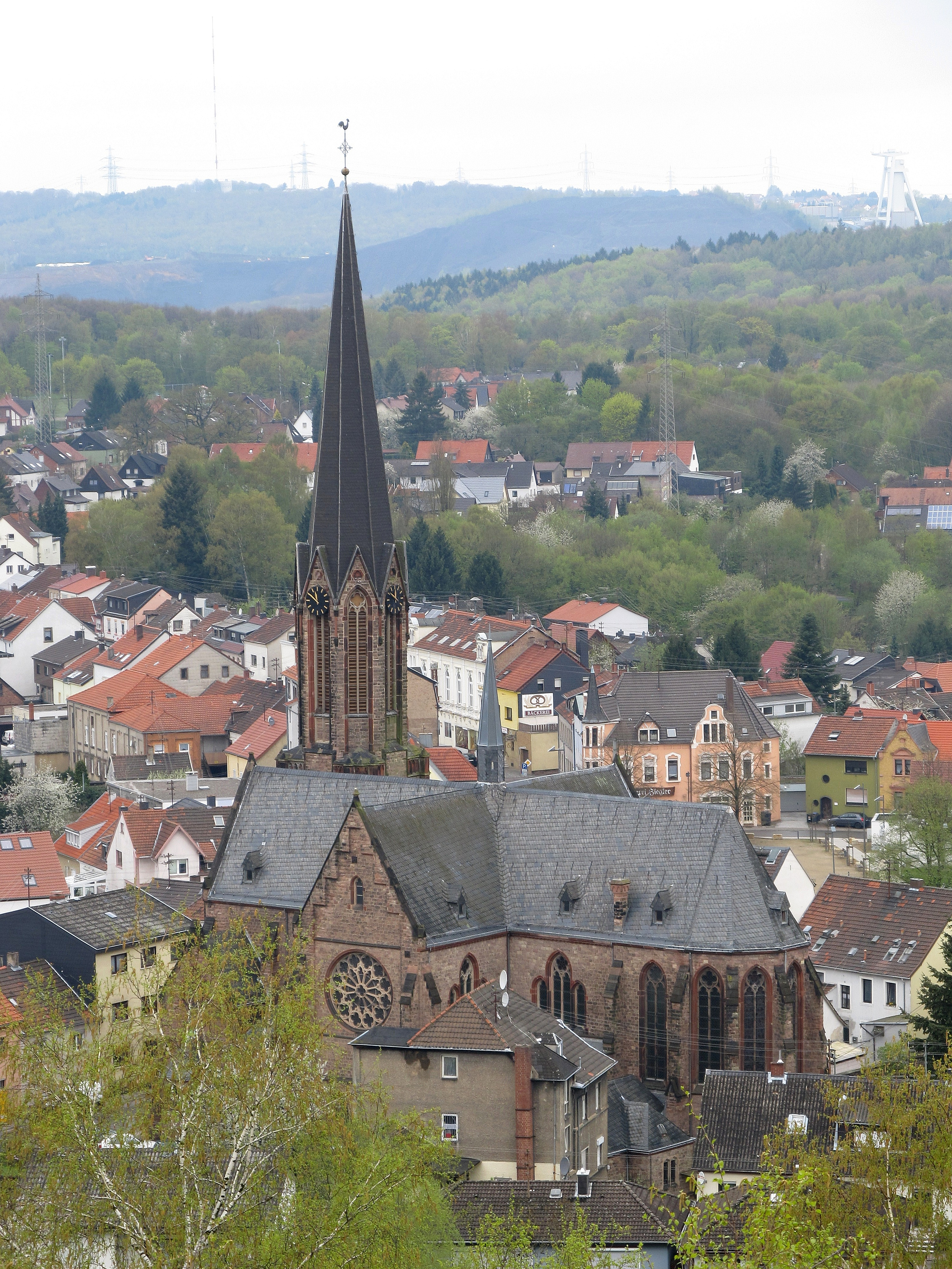 Blick vom Hoferkopfturm auf die katholische Pfarrkirche St. Josef in Bildstock, einem Stadtteil von Friedrichsthal (Saar), Regionalverband Saarbrücken, Saarland